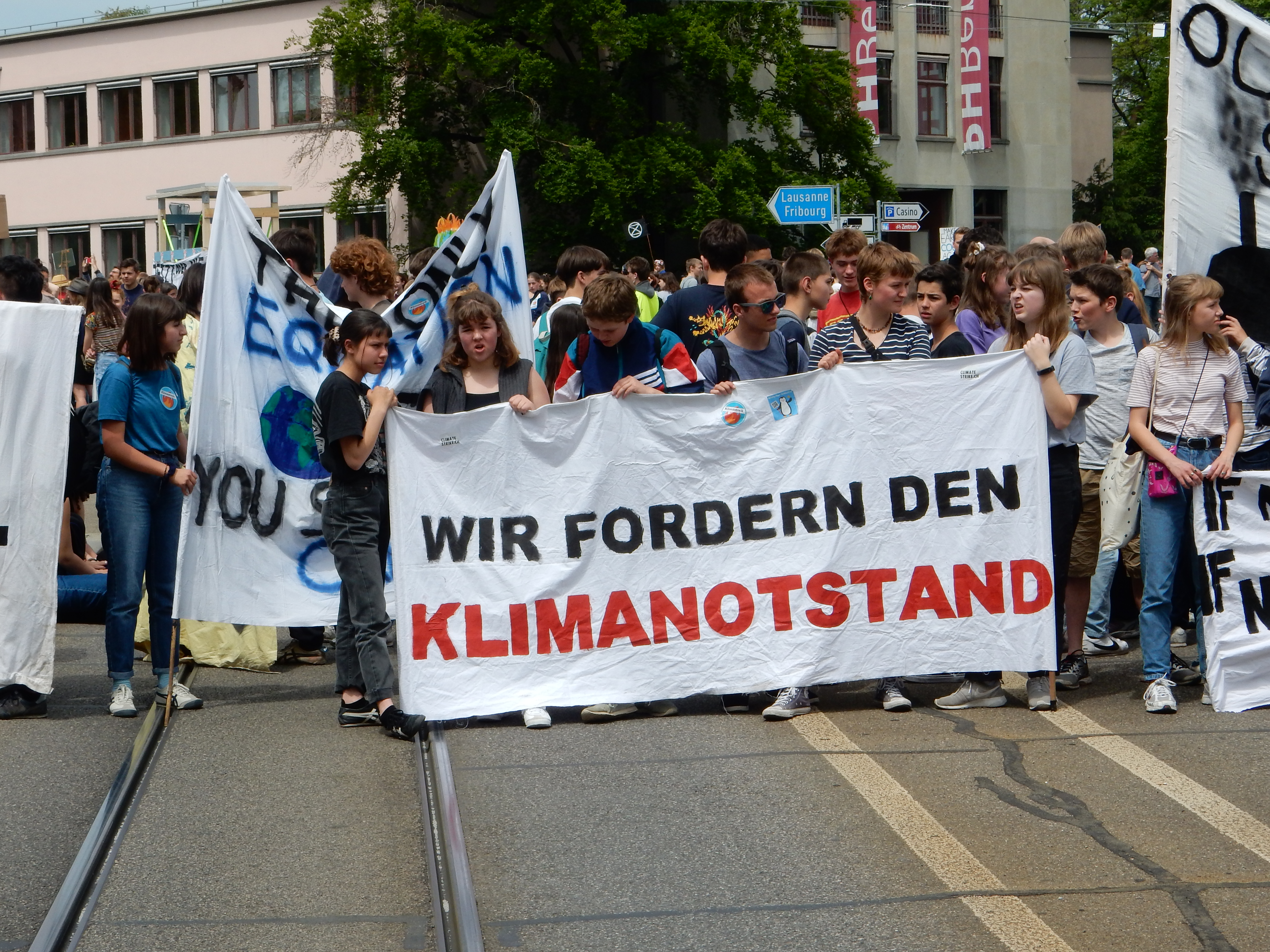 Klimastreik in Bern (Schweiz): Kundgebung auf dem Helvetiaplatz, Transparent: "Wir fordern den Klimanotstand"